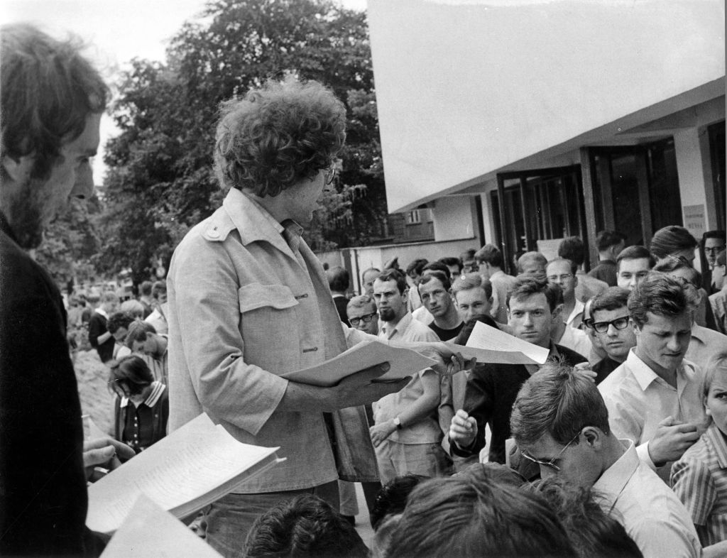 Ludwig Binder: Studentenrevolte 1967/68, West-Berlin; veröffentlicht vom Haus der Geschichte der Bundesrepublik Deutschland